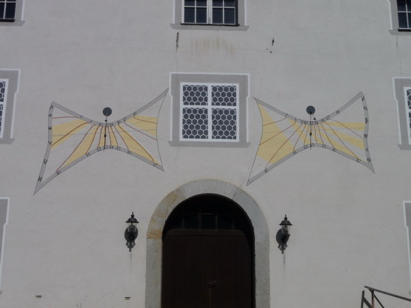 Die doppelt Sonnenuhr ist eine Kuriosität